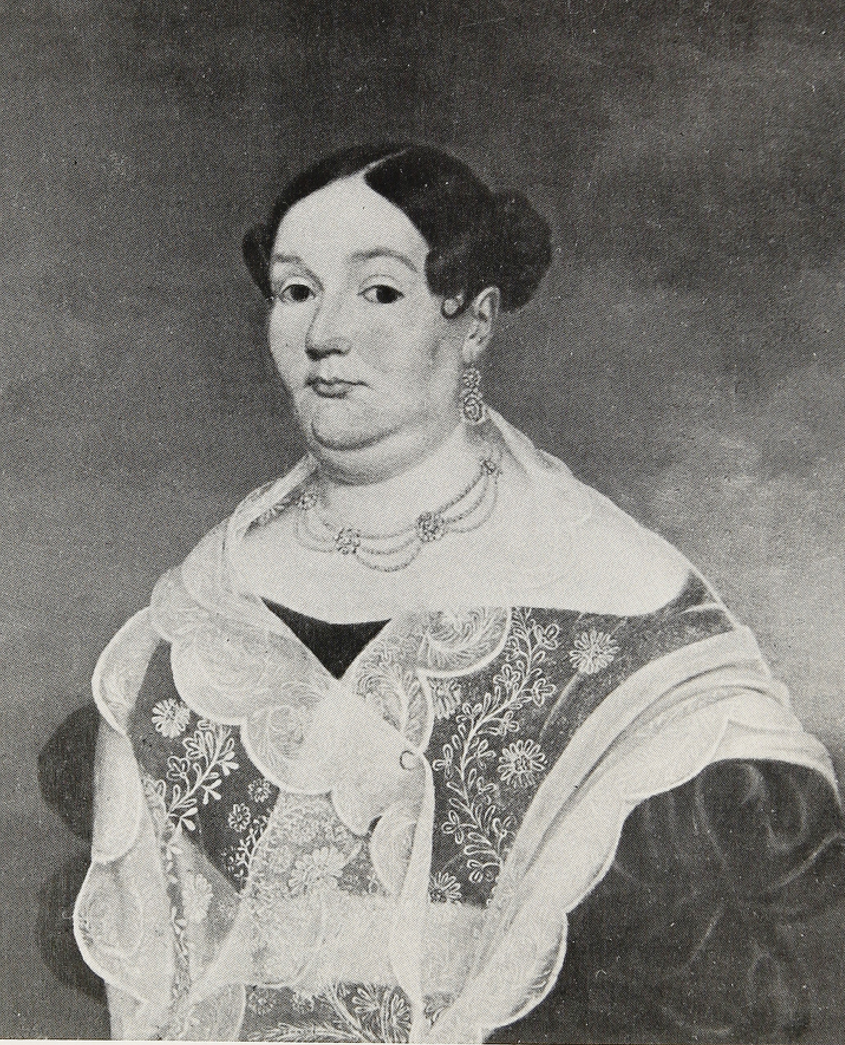 Retrato de doña Rafaela Bezanilla y Bezanilla, esposa de don José Tomás Ovalle y Bezanilla, su sobrino, Presidente de Chile 1830-1831. Oleo de autor anónimo, Santiago, c, 1830.